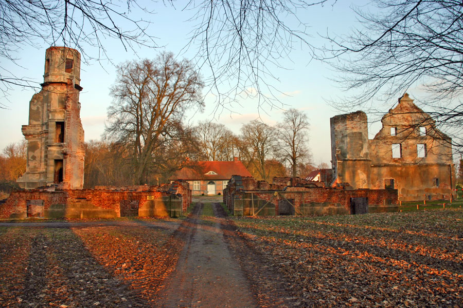 Herrenhaus Pansevitz Entstehungszeit um 1600, erbaut durch die Familie Krassow Nach Aussterben dieser Familie 1931 befand es sich bis zur Enteignung 1945 im Besitz des Grafen zu Knyphausen. Ursprünglich eine Renaissanceanlage, wurde das Schloss um 1860 im Stil der Neo-Renaissance saniert. 1963 wurde es fast völlig abgerissen. Dieses einst prachtvolle Herrenhaus ist leider nur noch als Ruine erhalten. Trotzdem ist noch die U-Form der Anlage sowie einzelne Bauteile und der gepflasterte Hof erkennbar. Graf und Gräfin Knyphausen kauften das Ruinengelände 1990 und sicherten in den folgenden Jahren die Ruine. Das östlich der Hofanlage Ende des 18. Jh. gebaute eingeschossige Kavalierhaus wurde nach dem Jahr 2000 im Zuge der Parksanierung instand gesetzt.